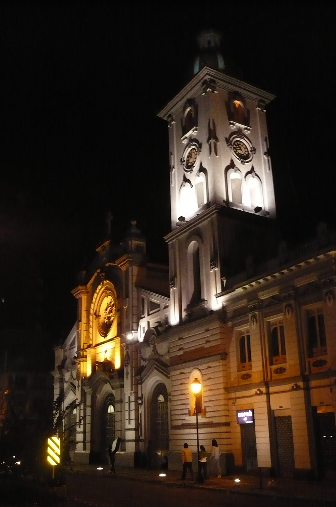 Caminando después del fin del Ibagué Jazz Festival.